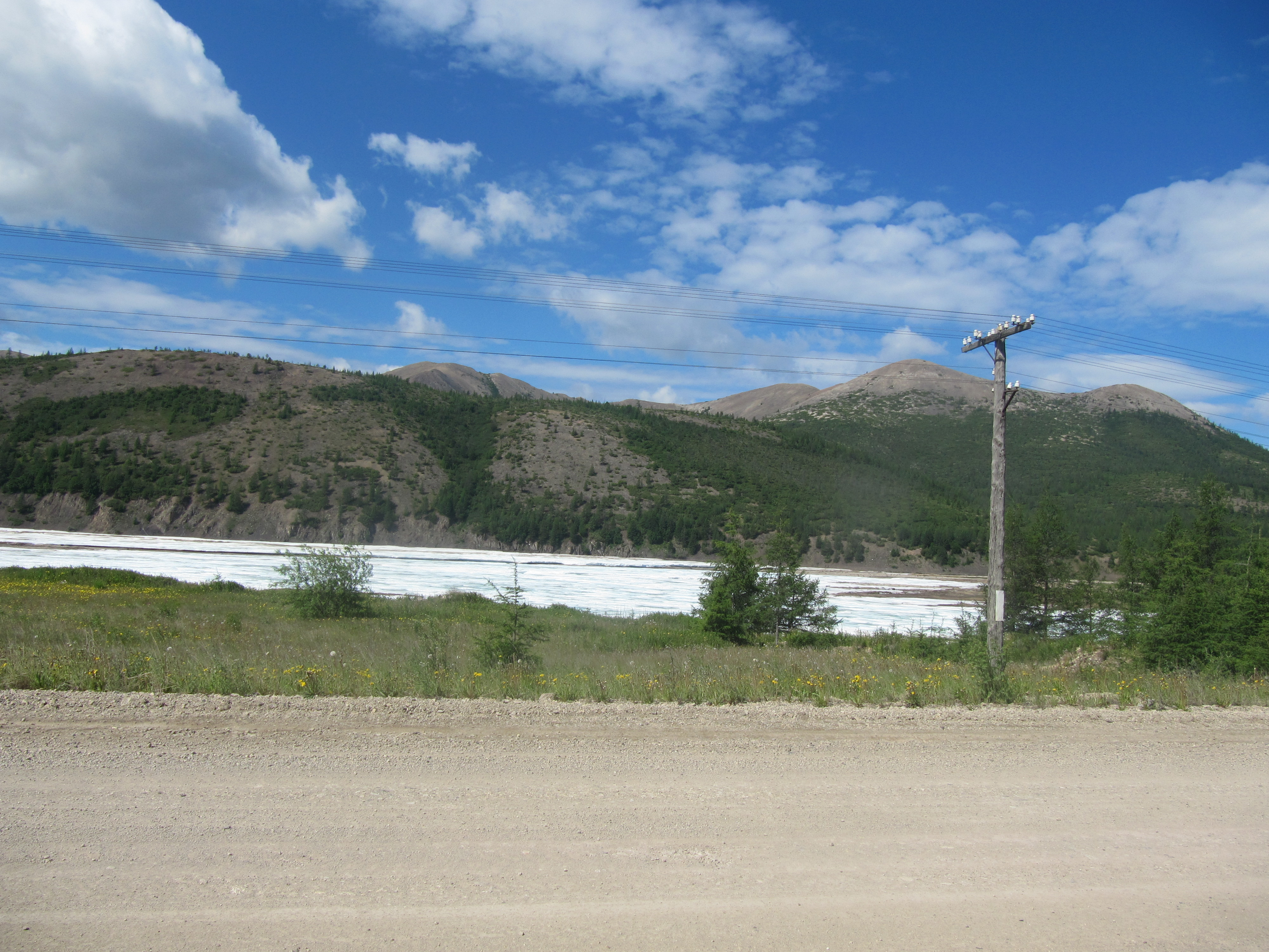 Kolyma Highway